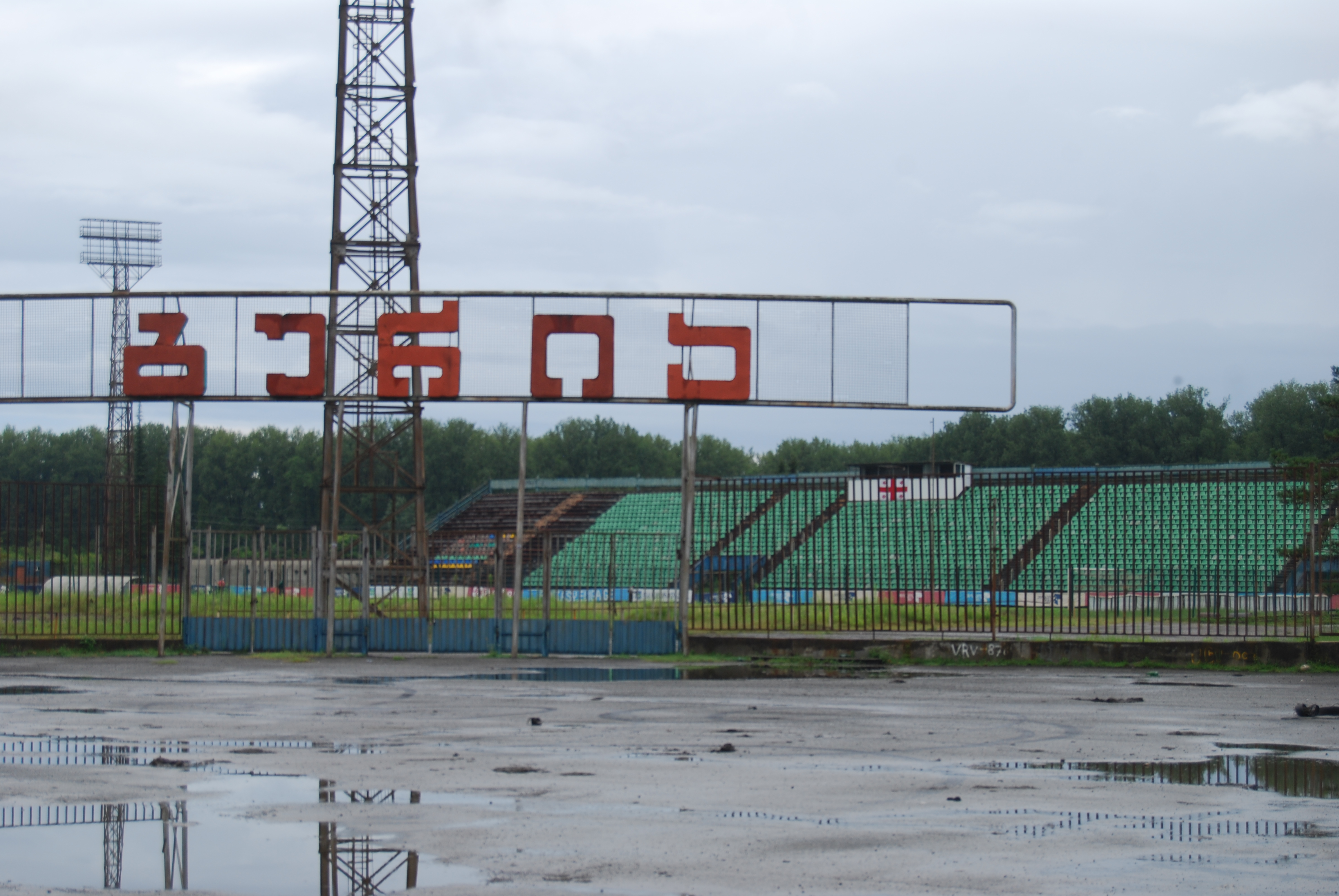 ევგრაფი შევარდნაძის სახელობის სტადიონი